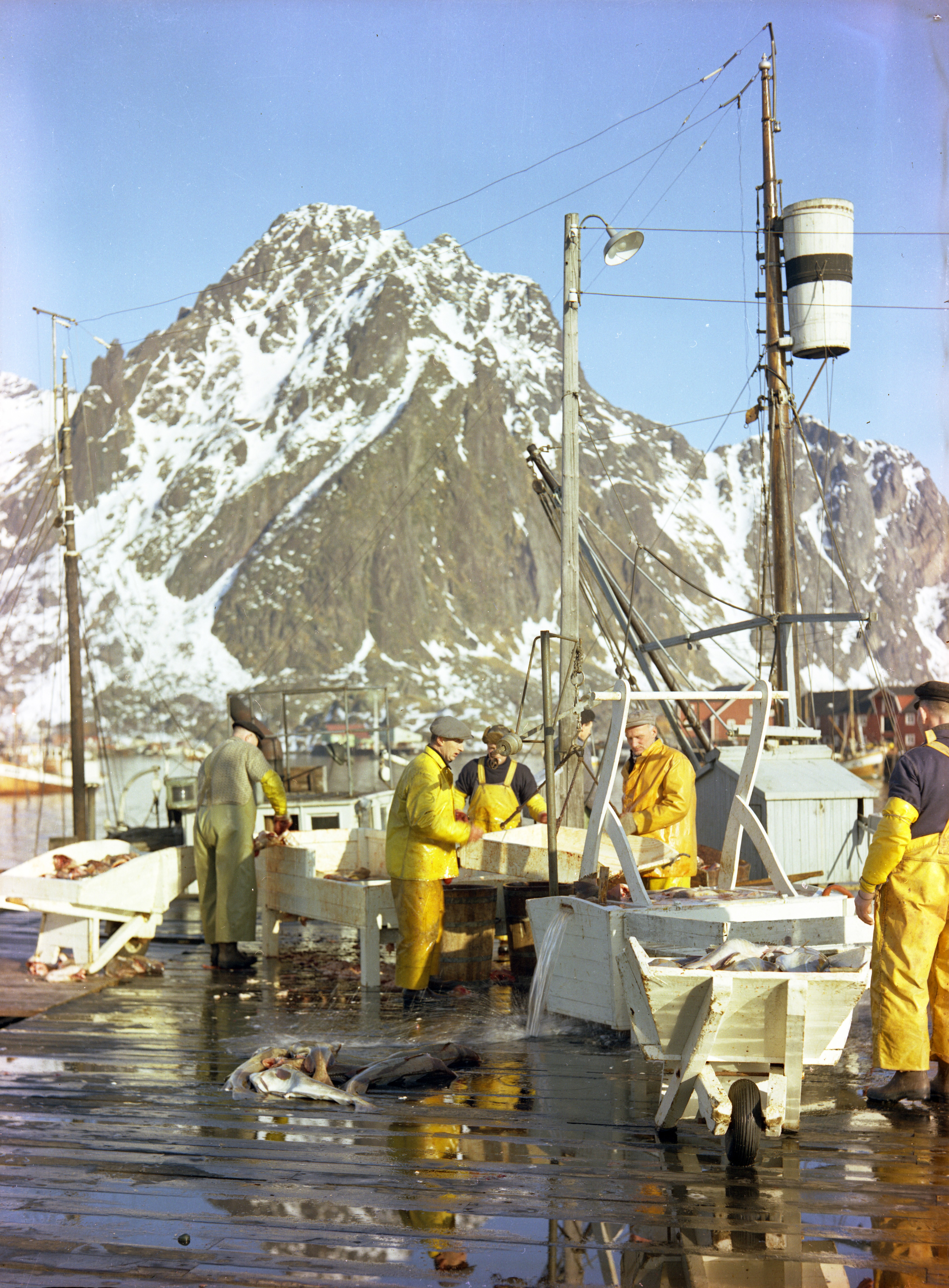 Bildet er hentet fra Nordlandsmuseet bildesamling etter Kanstad. Motivbeskrivelse: Svolvær med skrei Sted: Vågan, Svolvær, Havna Nøkkelord: Topografi og geologi Stedsnavn Fiske Marine industrier